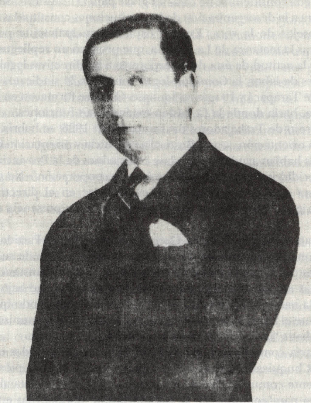 José Santos Salas. Médico, ex ministro y candidato presidencial en 1925.